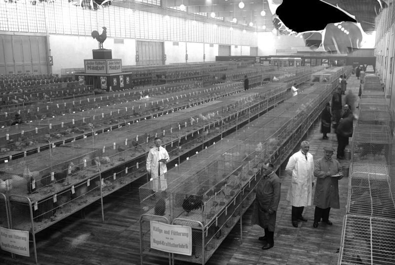 Interessantes von der V. Grünen Woche in Berlin! Blick in die große Halle für Geflügelzucht mit tausenden von Hühner-und Taubenkäfigen auf der Ausstellung.